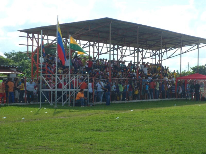 Estadio de Futbol Ubicado en Guasdualito, Estado Apure.